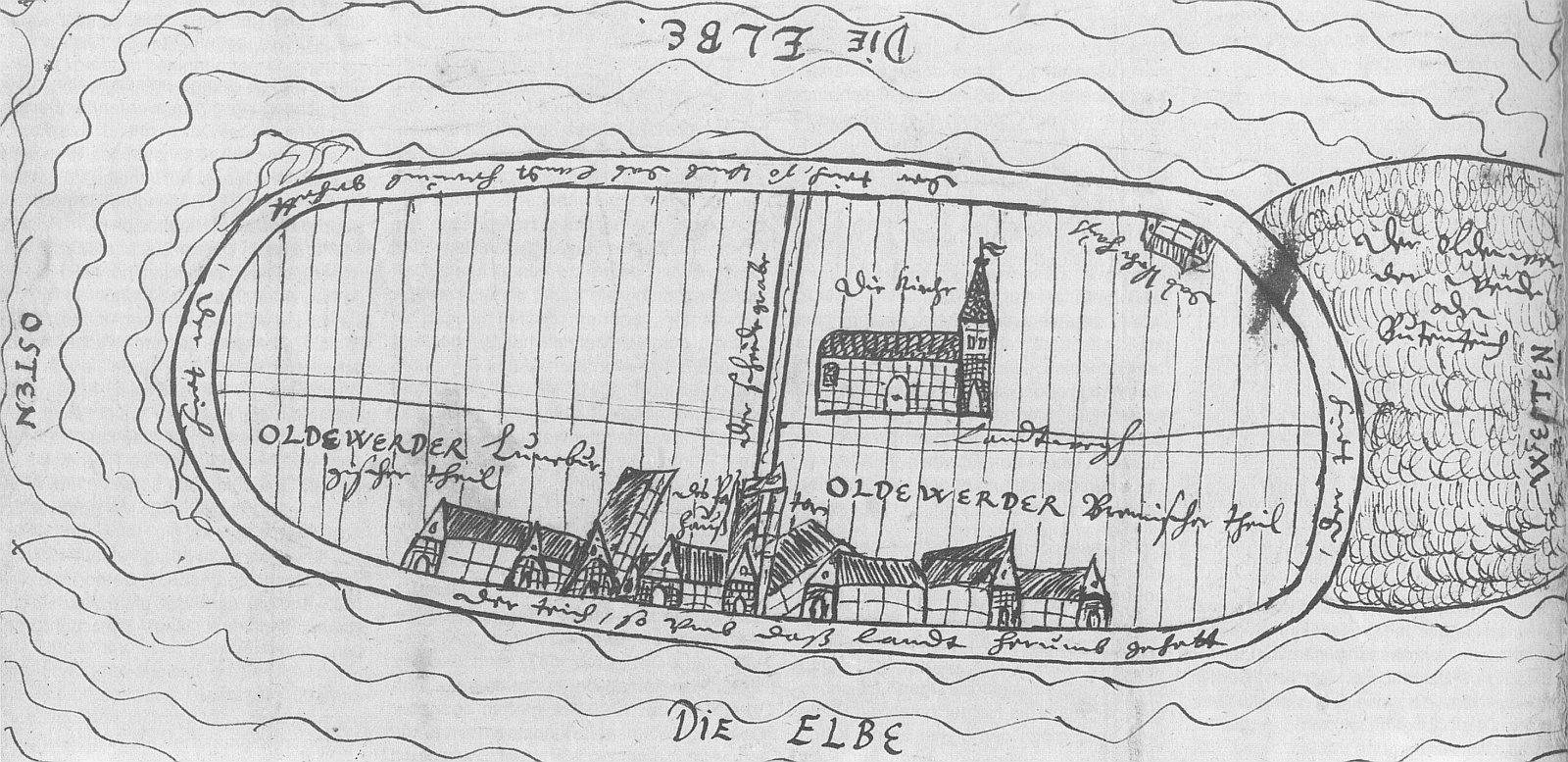 Altenwerder Deichkarte von 1615